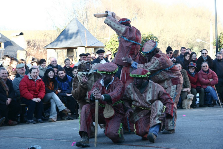 2009ko Barkoxeko Maskaradak Barkoxen. 2009-01-19. Buhameak.